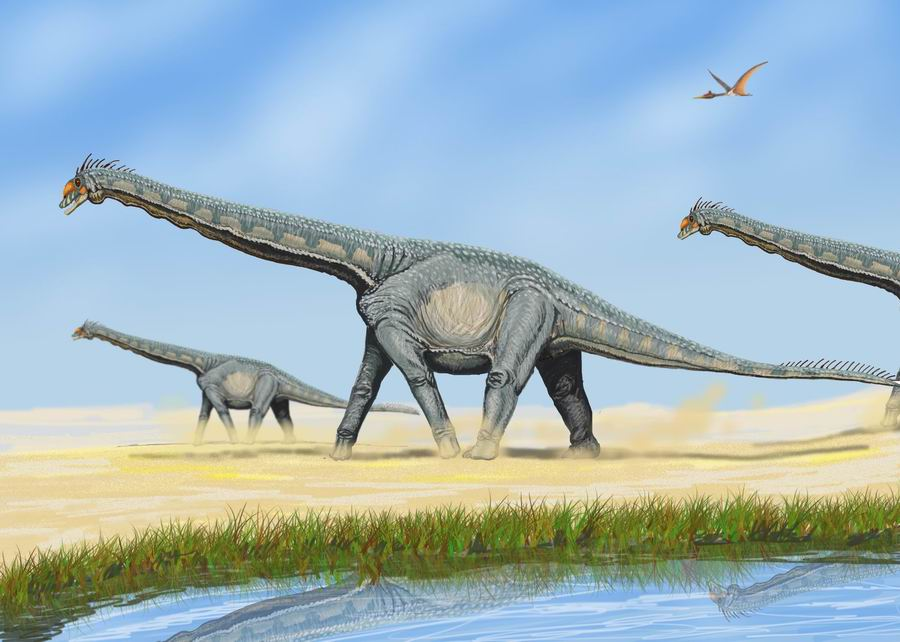 Alamosaurus, autor - Bogdanov,2006